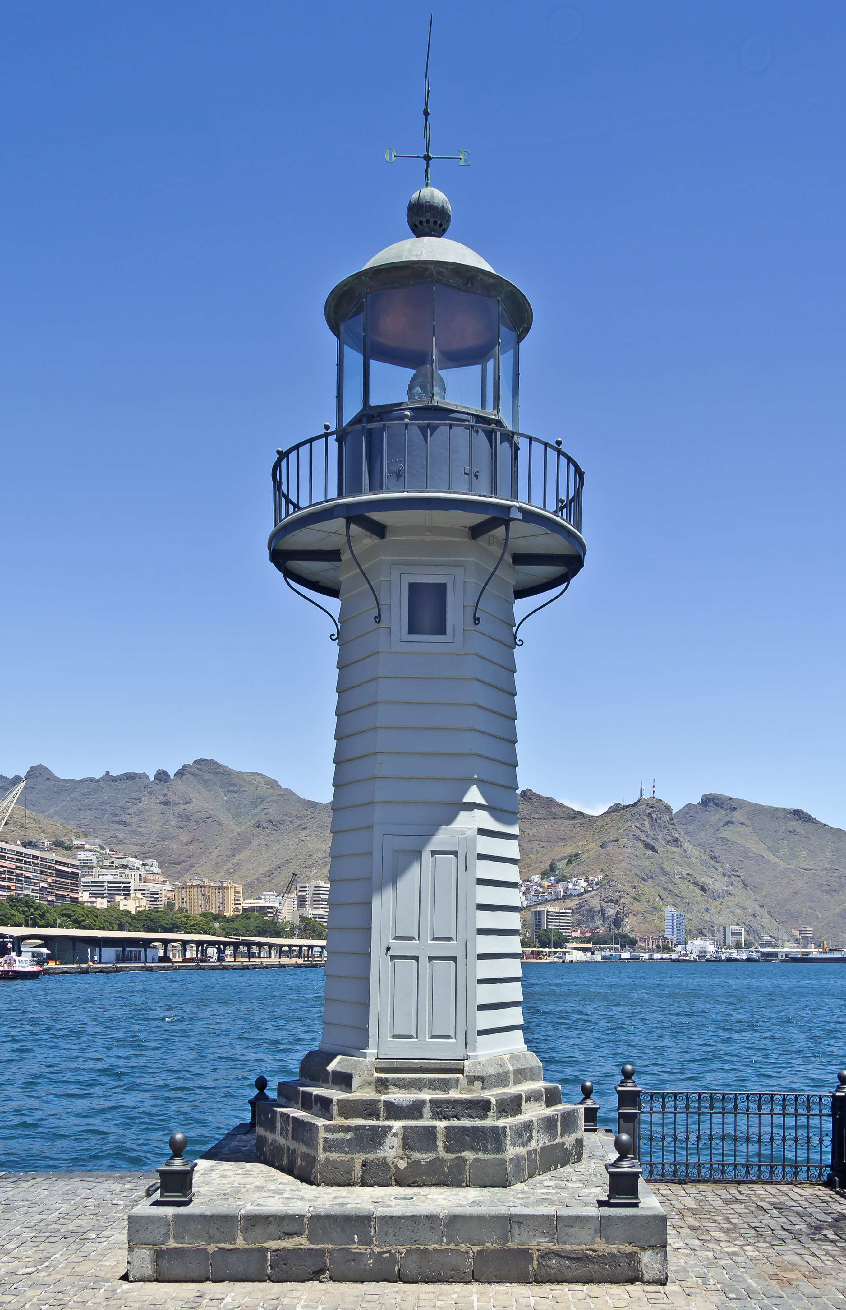 La Farola del Mar es un pequeño faro, o señal luminosa, que se encendió en diciembre de 1863